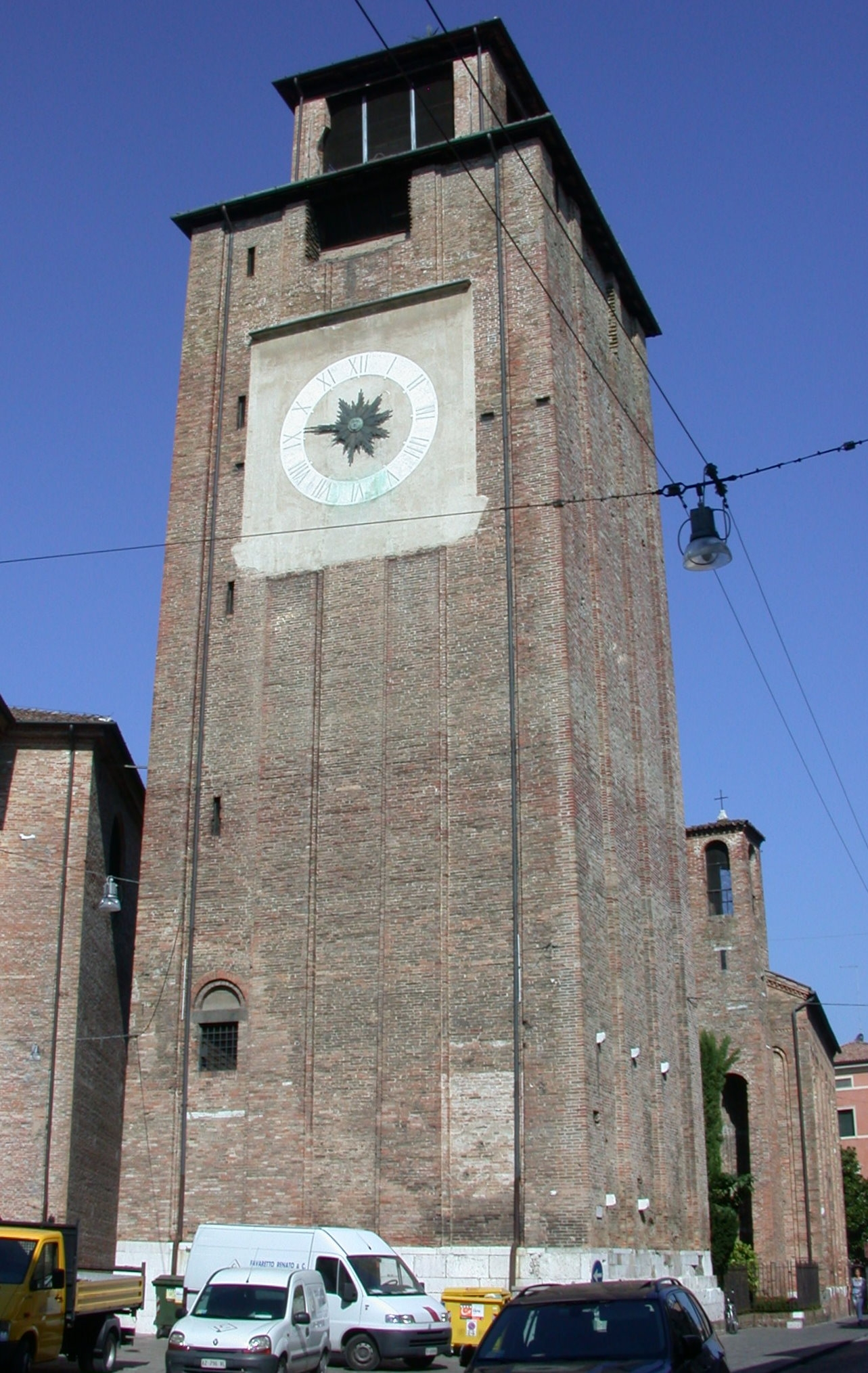 Il campanile del Duomo a Treviso